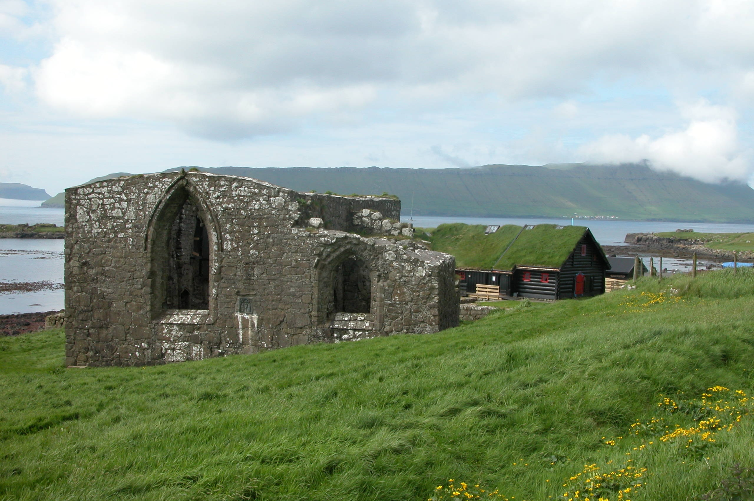 Kirkjubøur on Streymoy, Faroe Islands